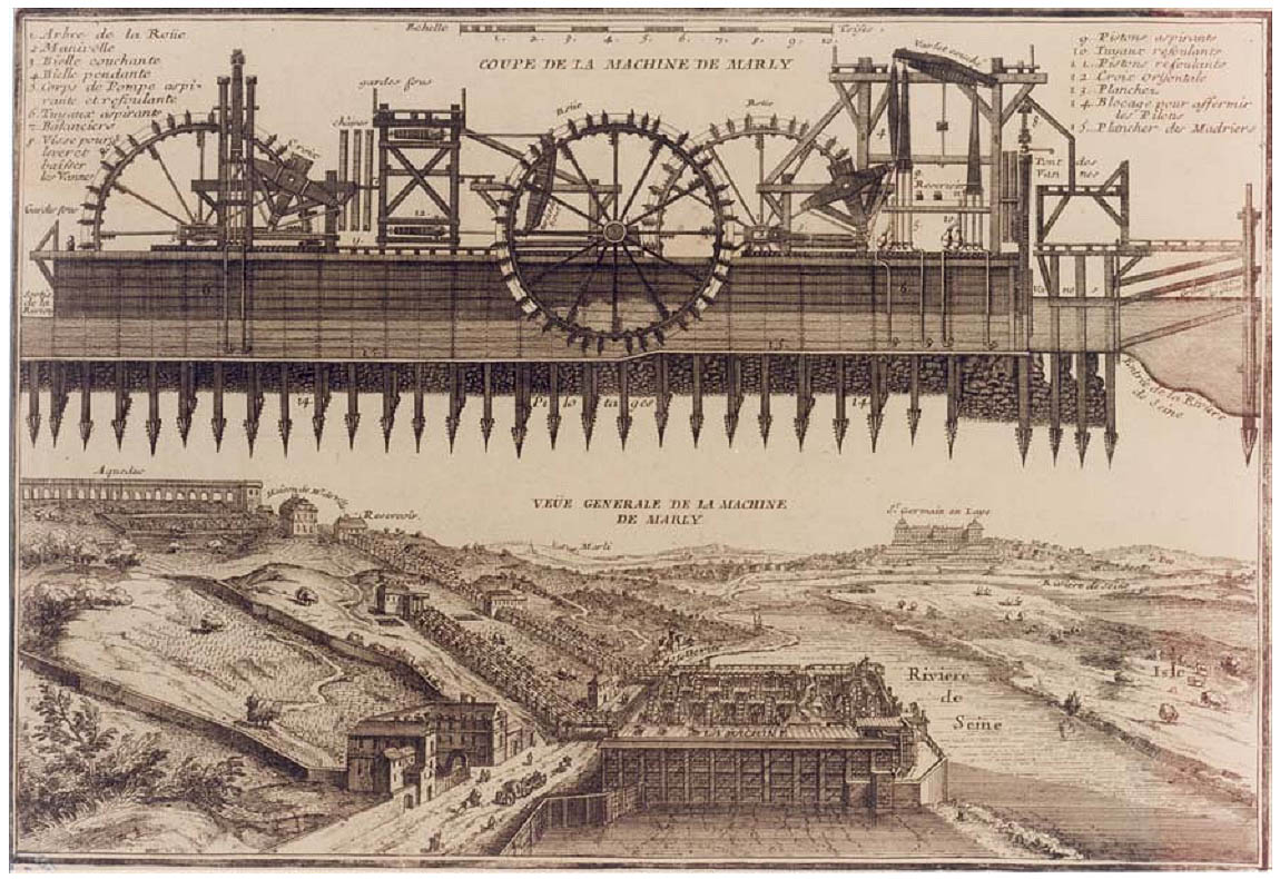 Vue générale et coupe de la machine de Marly.